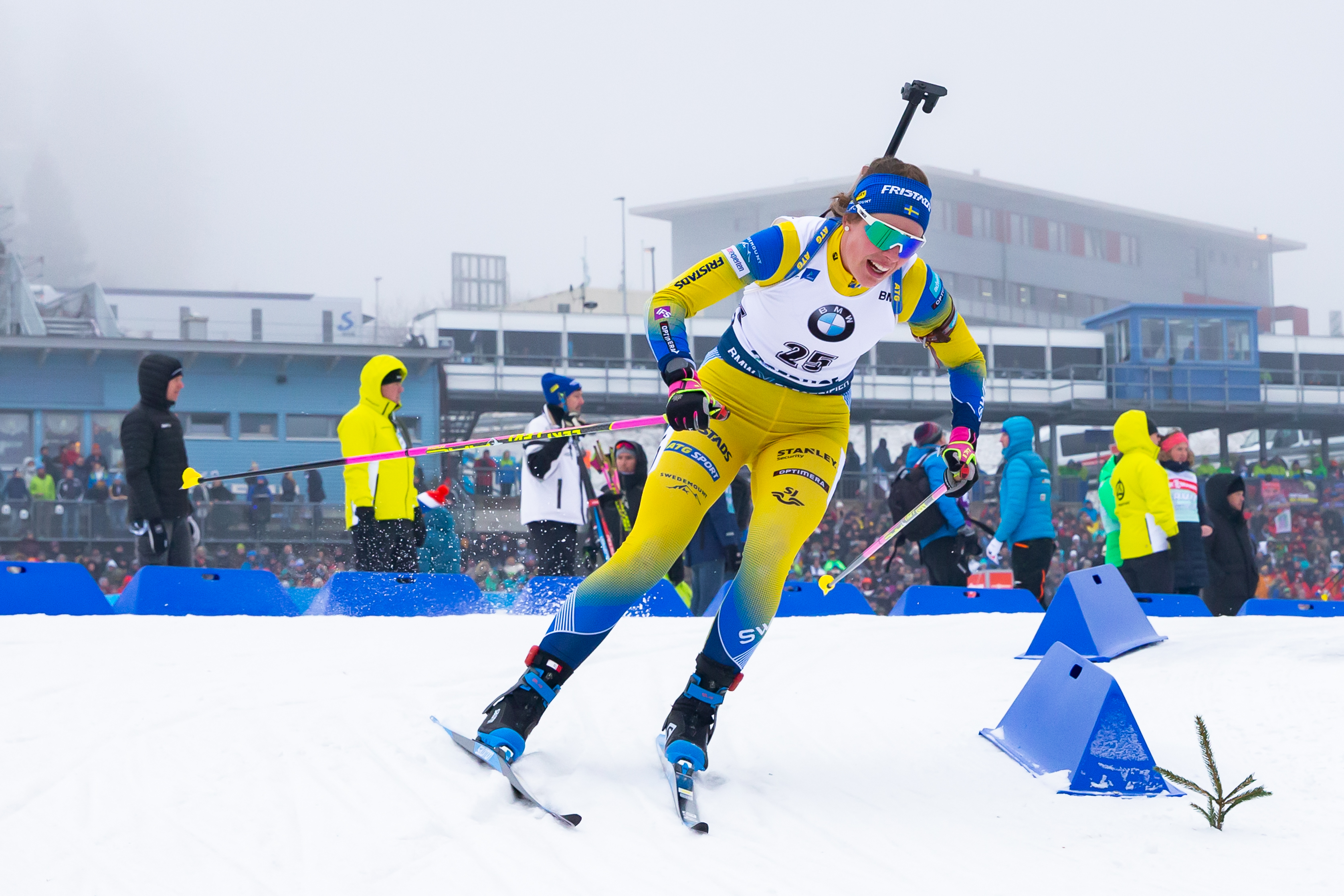 IBU World Cup Biathlon Oberhof; Elvira Oeberg (SWE, Schweden)